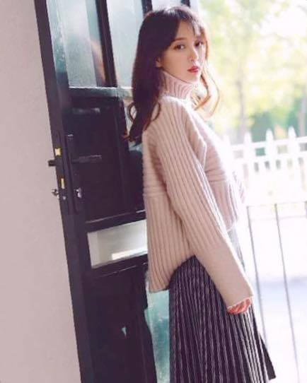 汪小敏照片攝於宣傳活動2016年10月